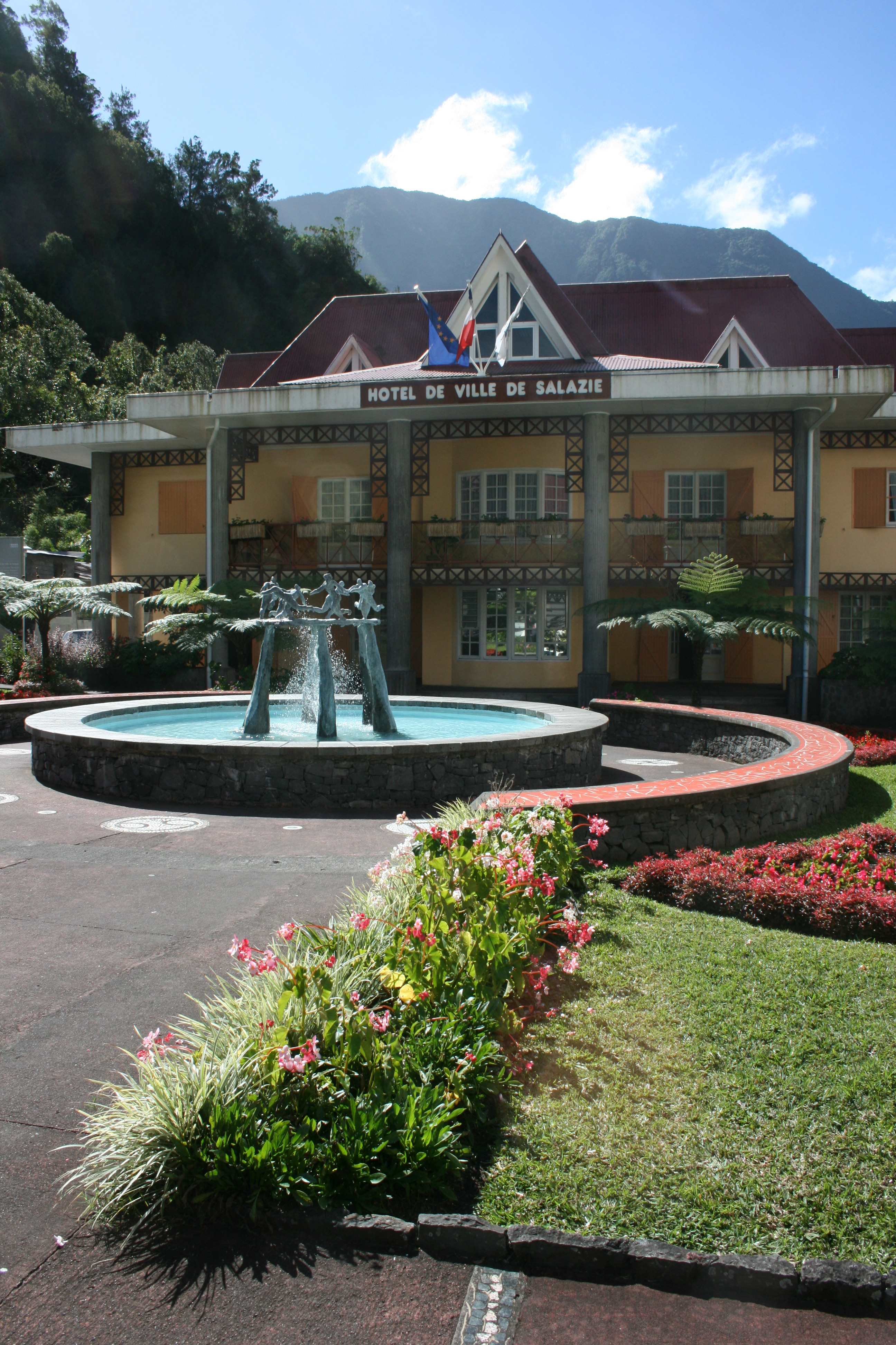 L'hôtel de ville de Salazie, à la Réunion